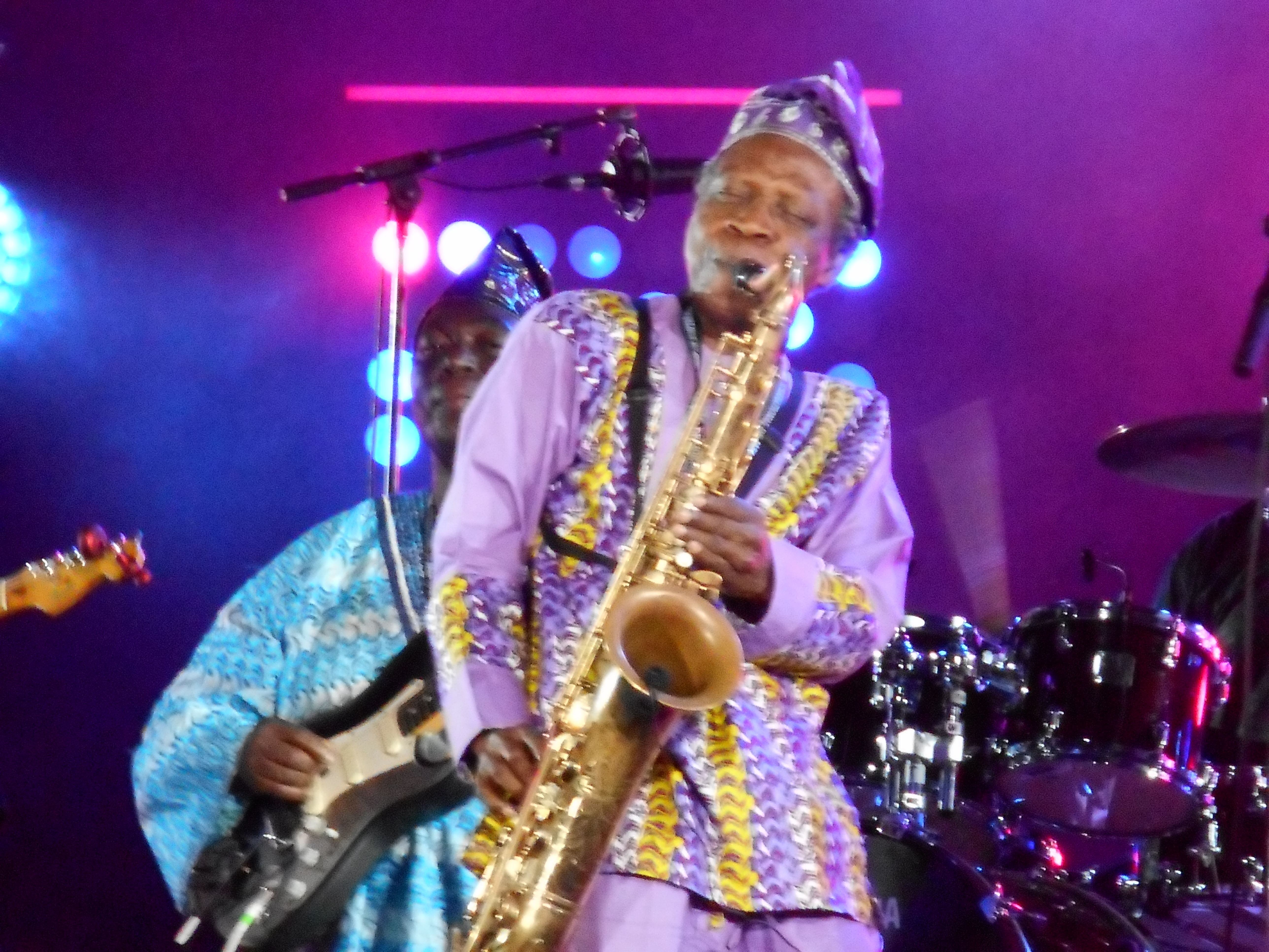 Spectacle de Orlando Julius & The Afrosoundz, le 6 juillet 2016, à la place des Festivals, dans le cadre du Festival international de jazz de Montréal